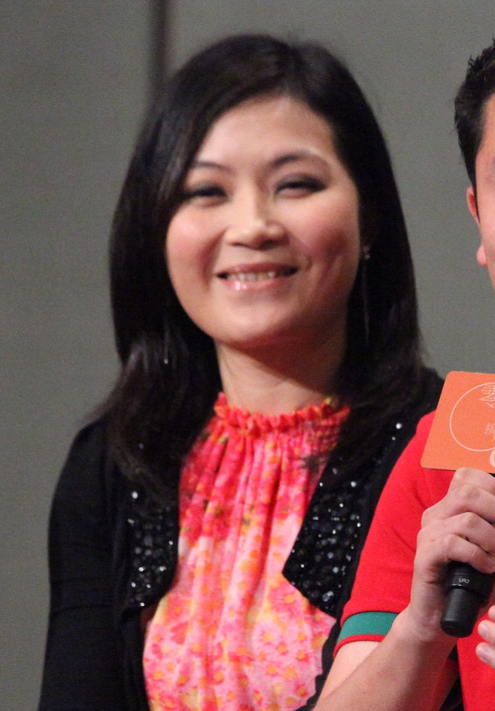 中文（香港）: 世界視窗講座：《零距離接觸CY》新書發佈會